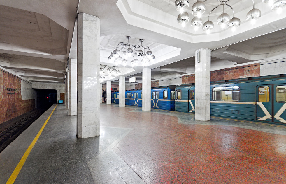 Станция Коммунаровская Днепропетровского метрополитена. Поезд 81-717/714 на станции